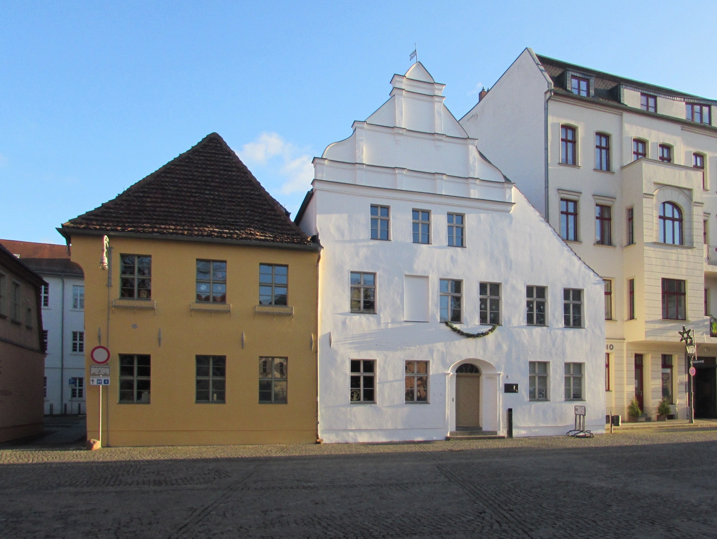 altstädtischer markt in brandenburg, Sekretariats- und Syndikatshaus